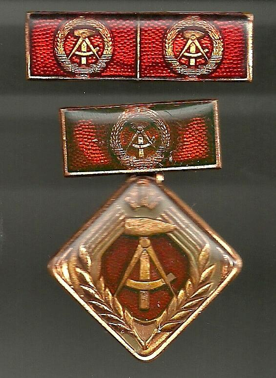 Aktivistenorden mit Interimsspange für 2-fache Auszeichnung